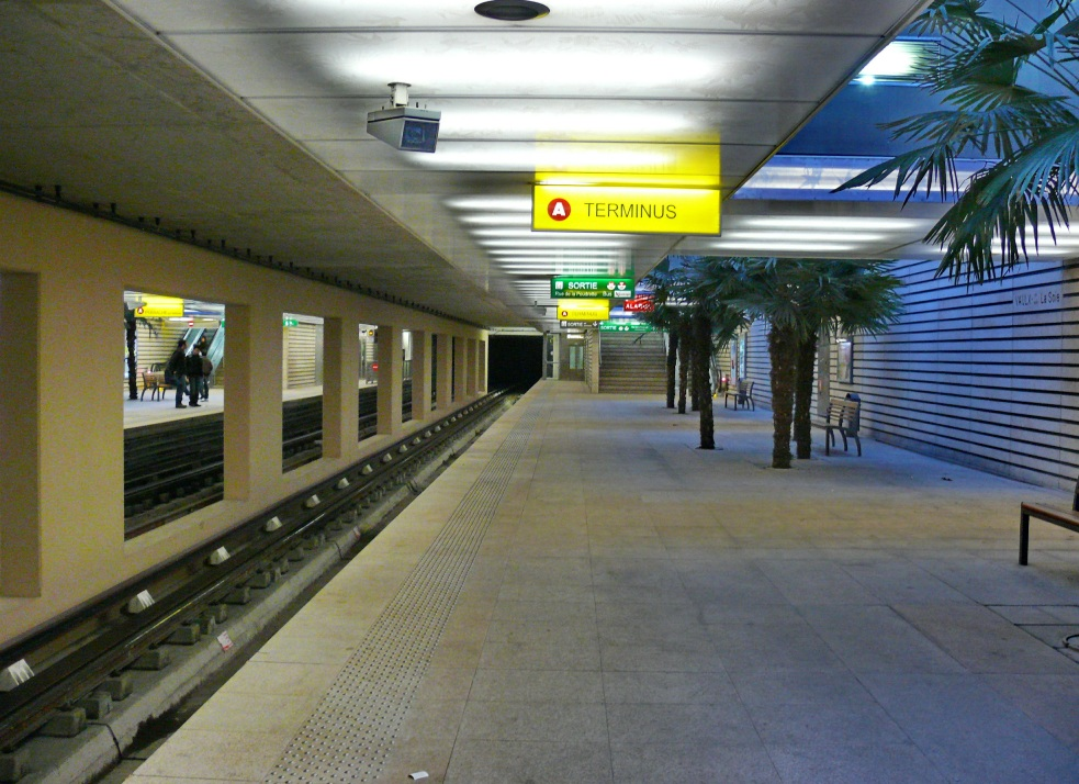 La station de métro Vaulx-en-Velin - La Soie (ligne A du métro de Lyon)